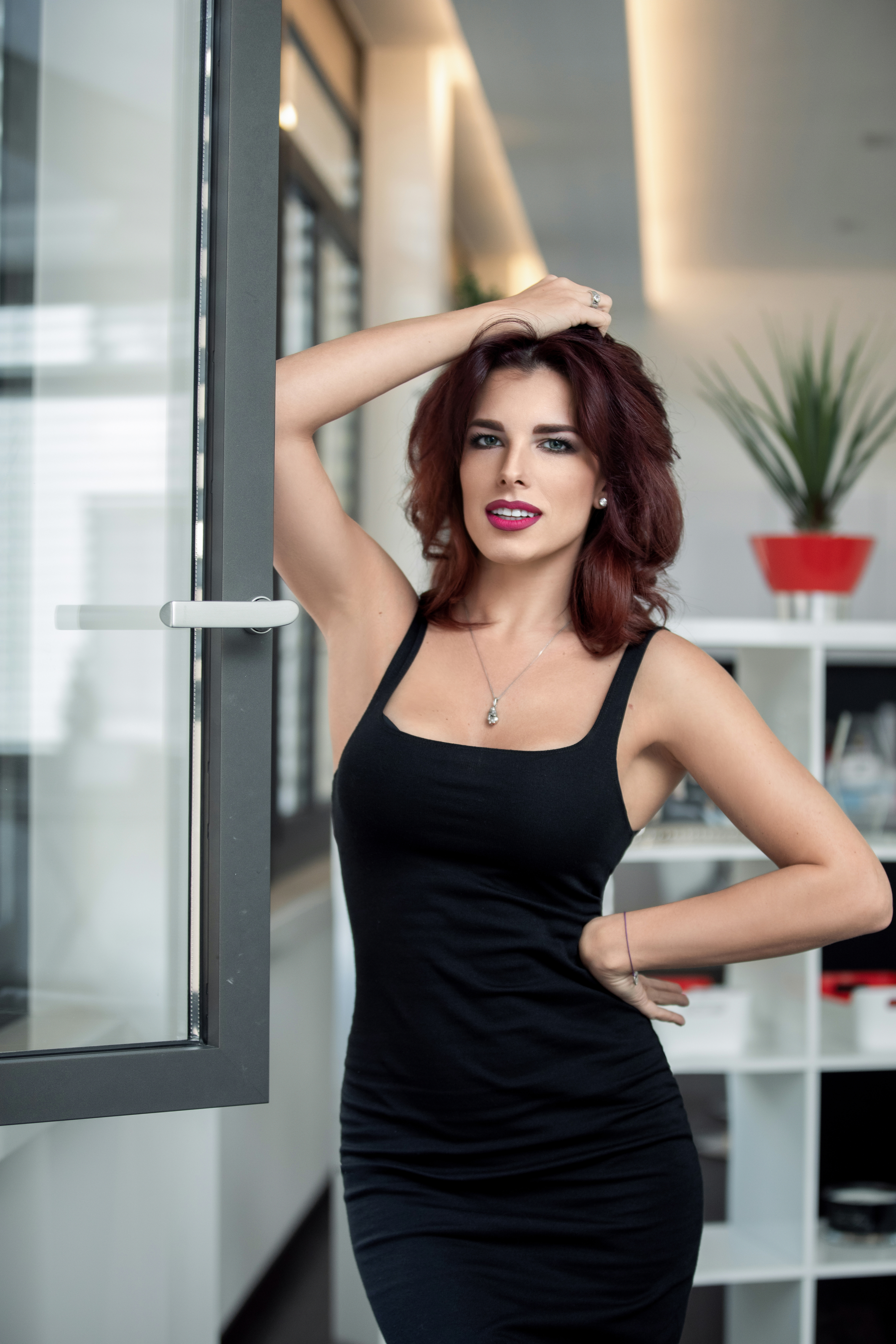 Ольга Романовская для фотосессии в 2017 году